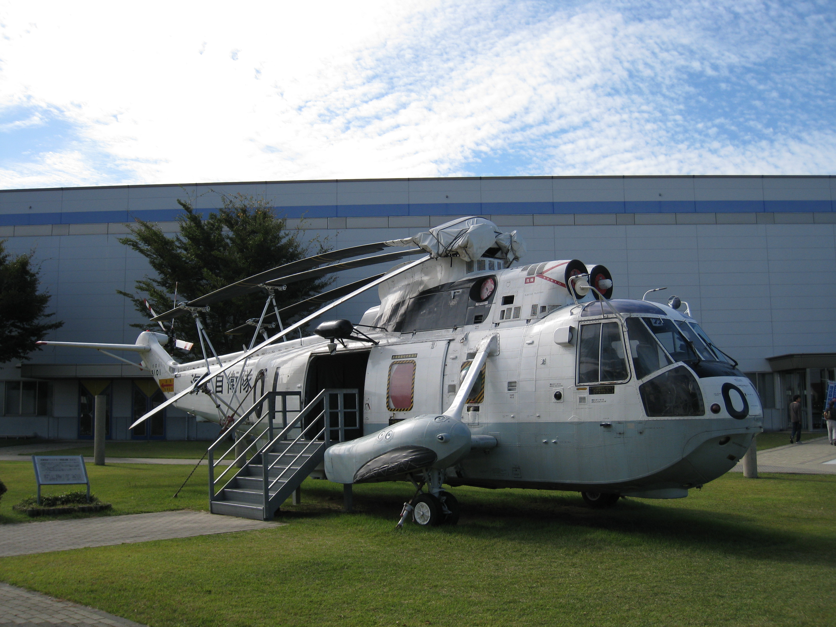 対潜哨戒ヘリ「HSS-2B」。石川県小松市（石川県立航空プラザ内）Helicopter "HSS-2B", at Ishikawa Aviation Plaza (石川県立航空プラザ), Komatsu, Ishikawa, Japan